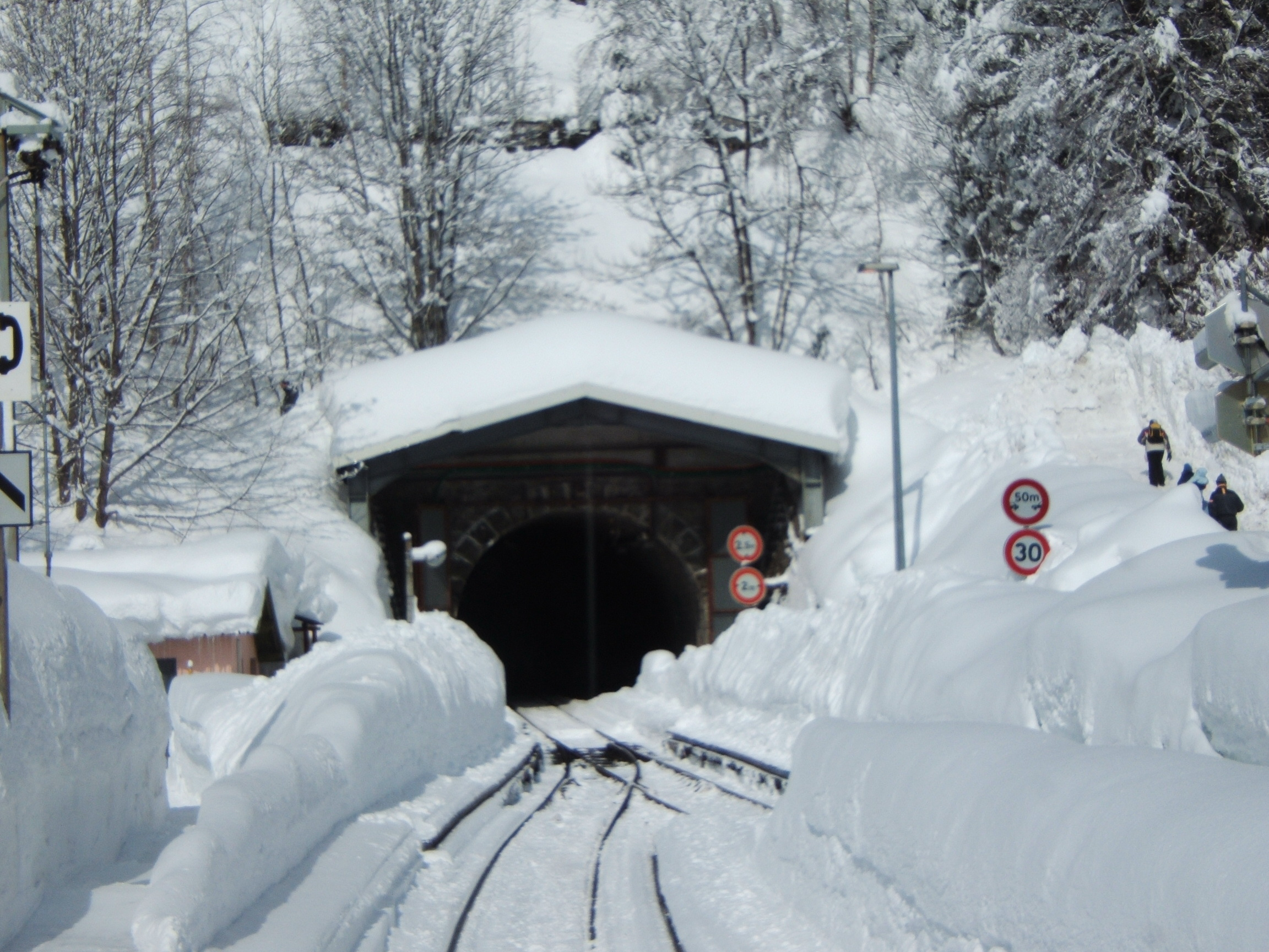 Gare de Montroc-le-Planet, Haute Savoie, France - Tunnel des montets côté Montroc